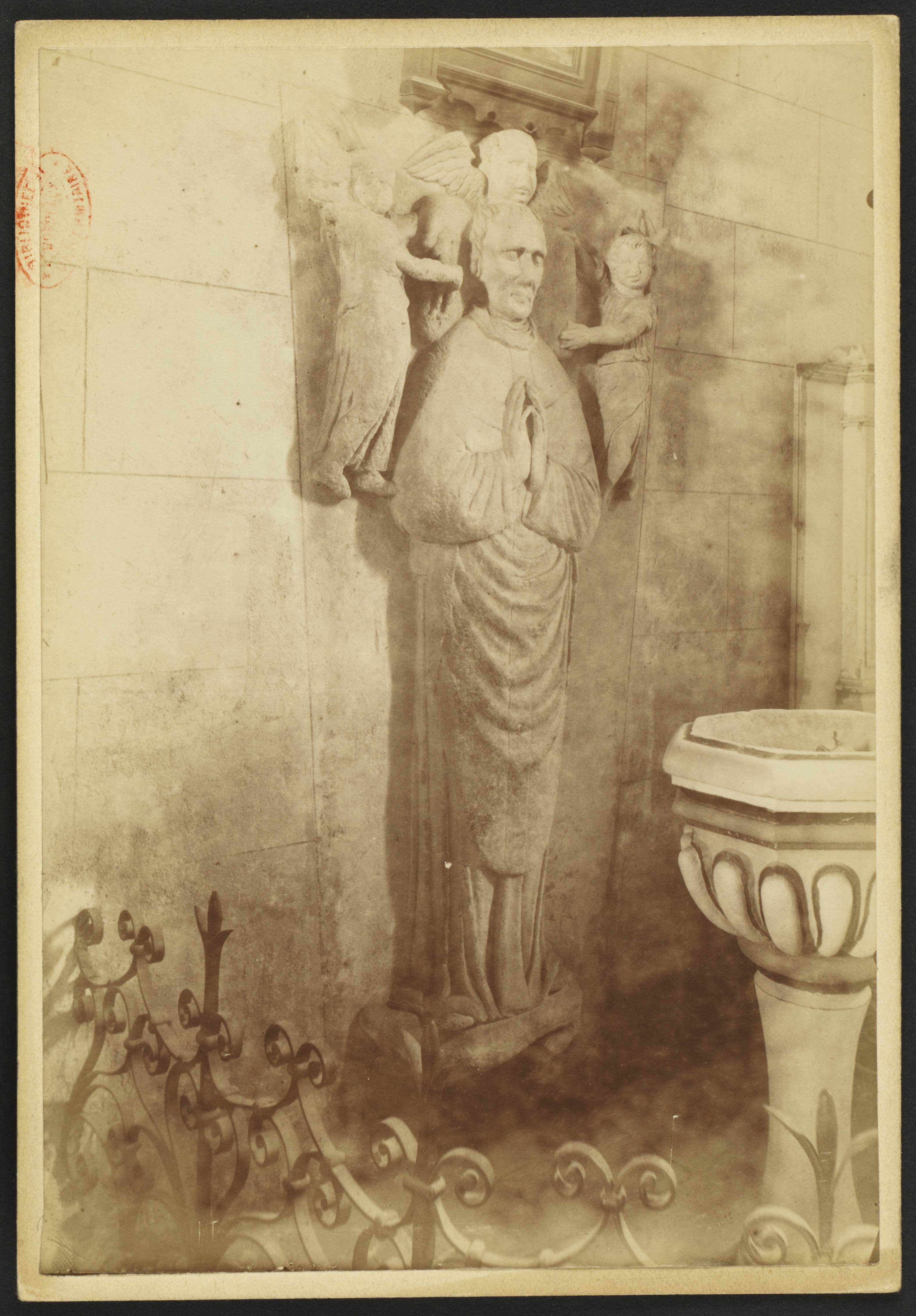 Église Saint-Roch de Blésignac; Pierre tombale